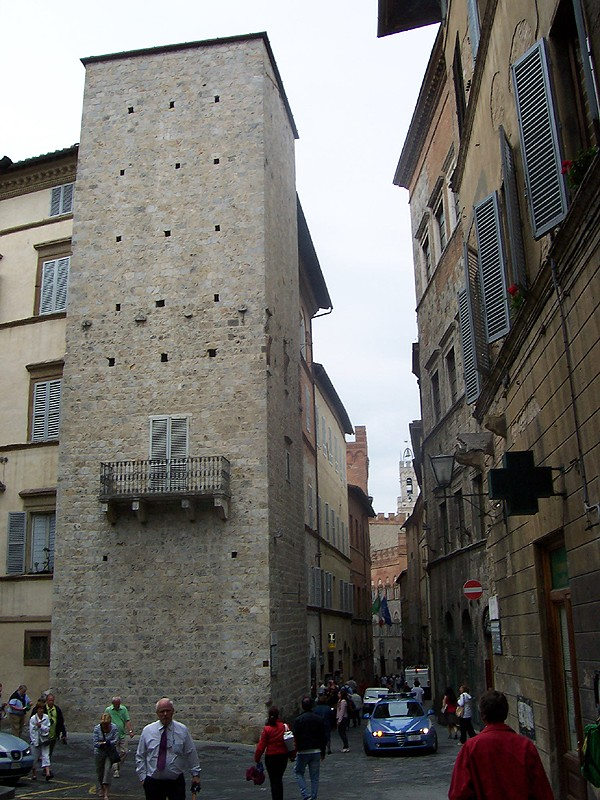 Siena - Torre Forteguerri